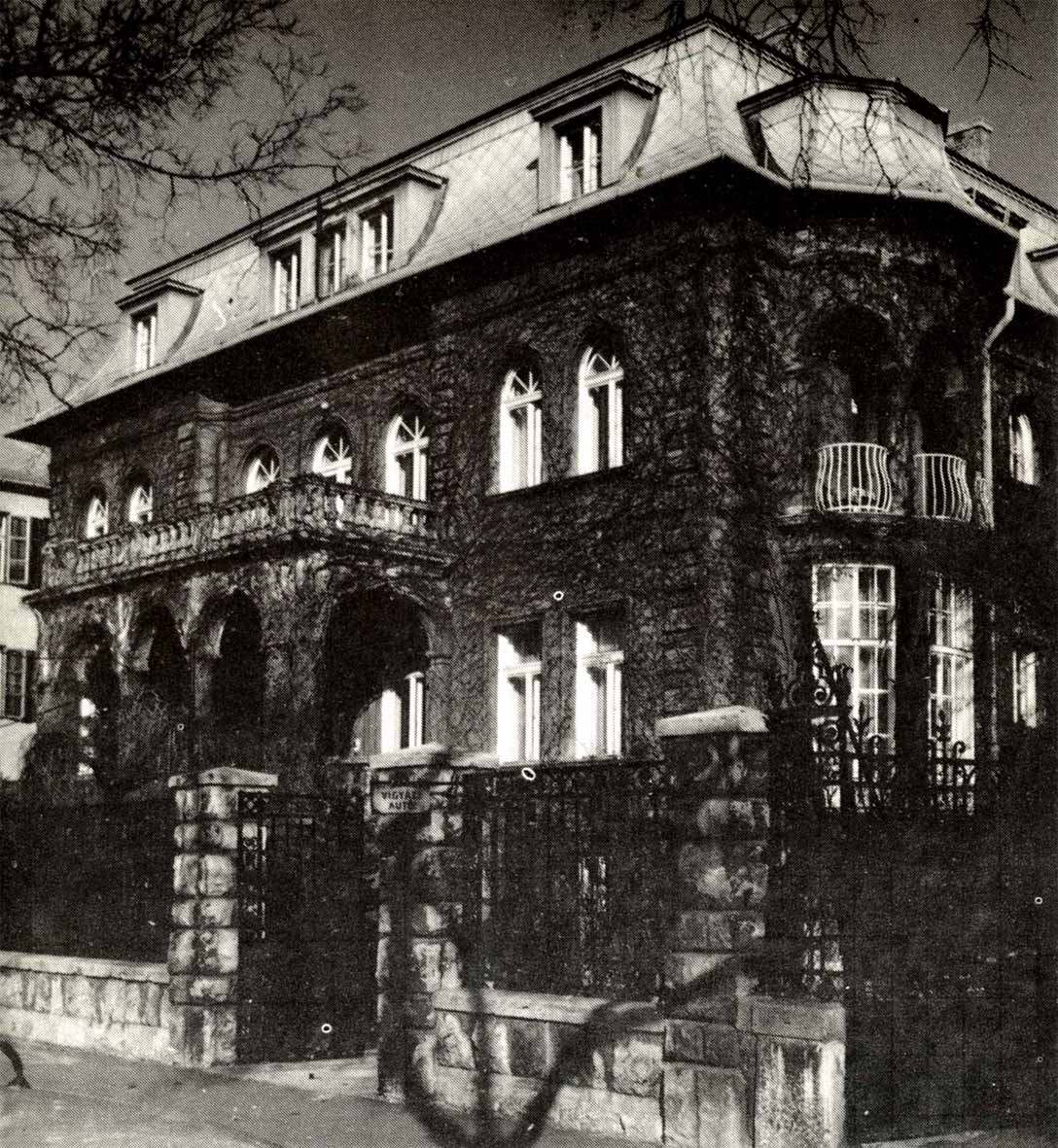 A Stefánia (korábban: Népstadion) úti épület